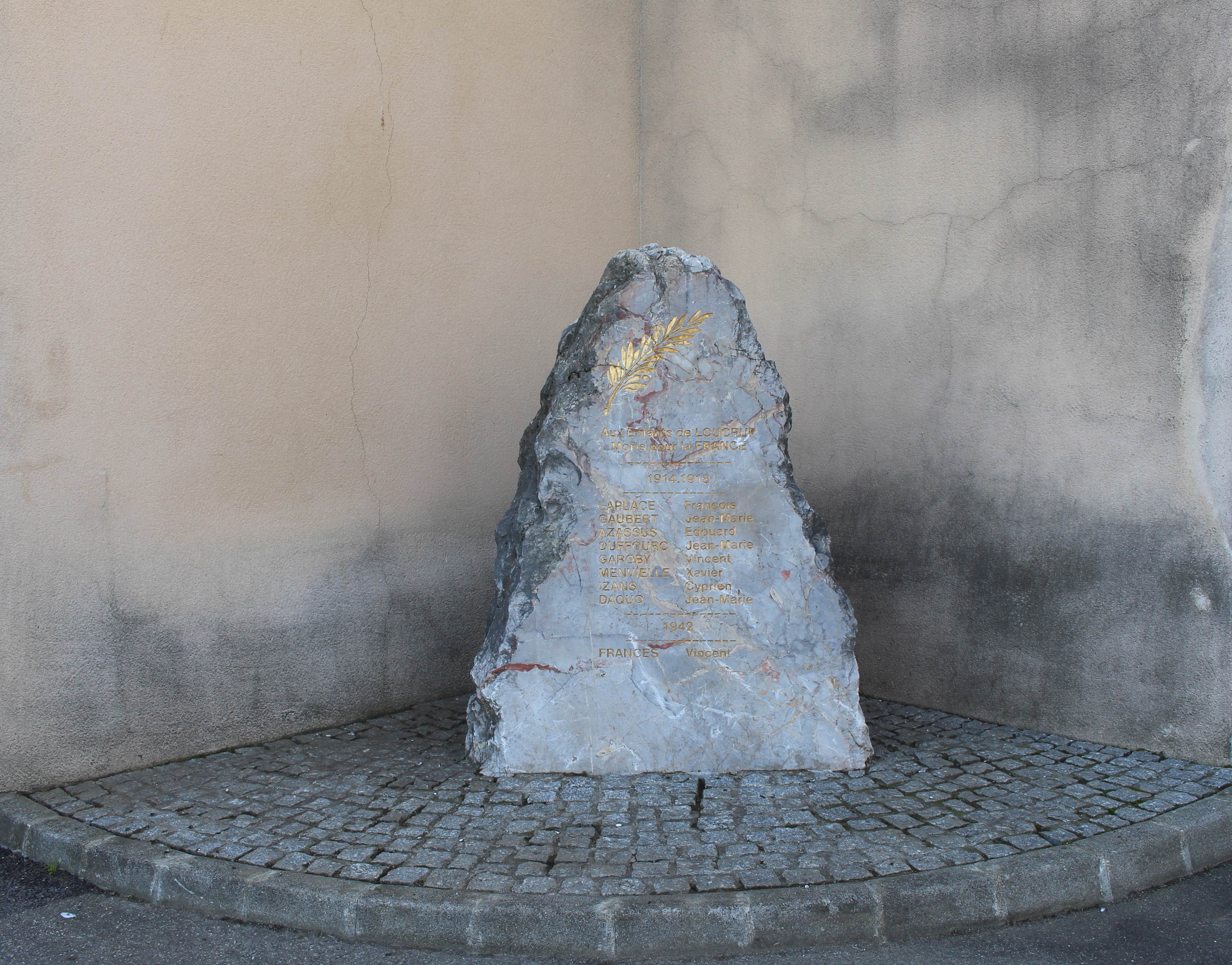 Monument aux morts de Loucrup (Hautes-Pyrénées)